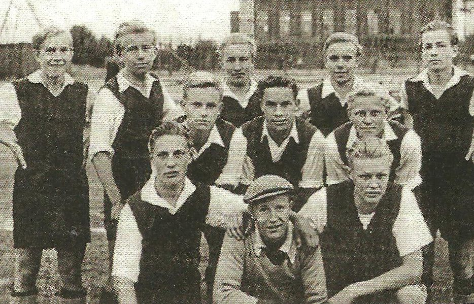 LPM:n A-juniorit vuonna 1948